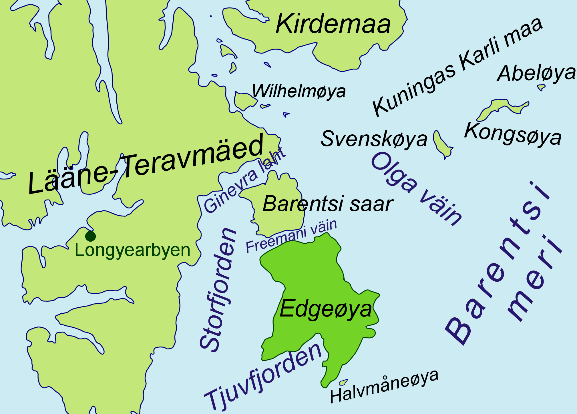 Edgeøya kaart